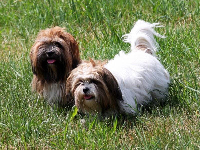 Sari und Raja vom Tal der Zwerge